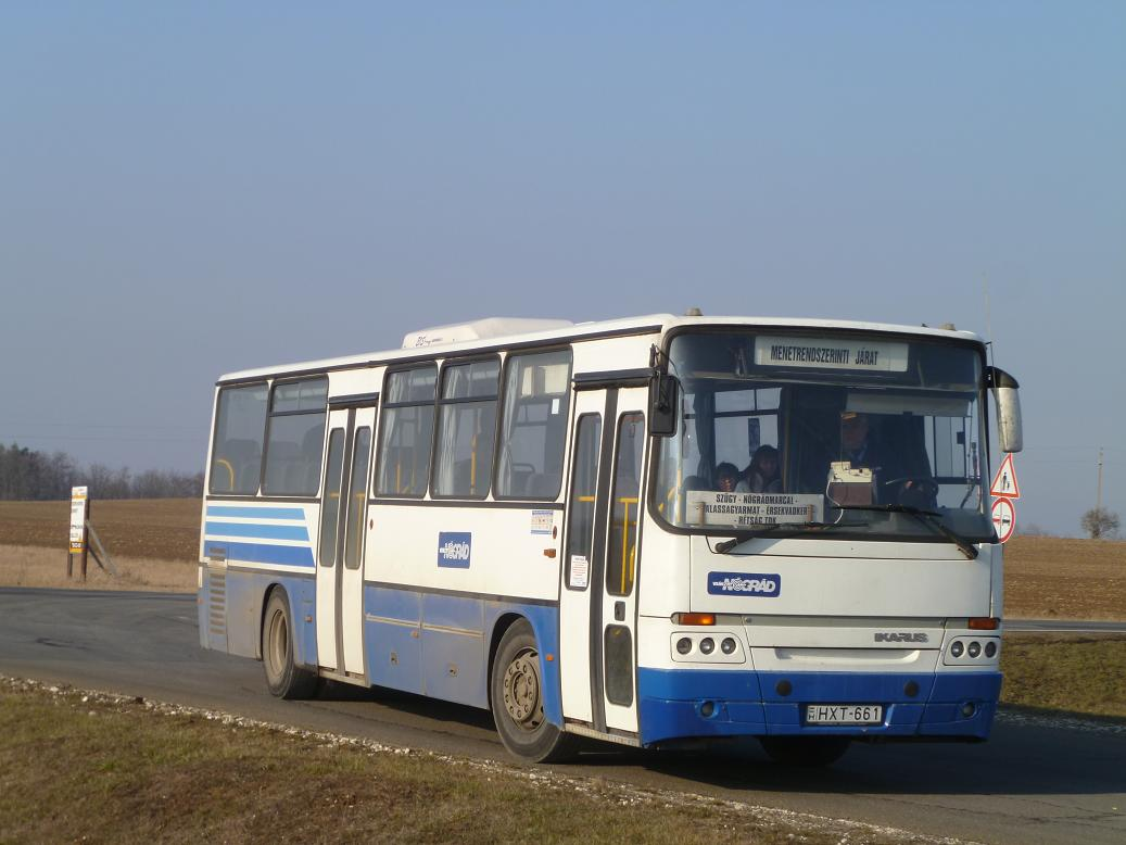 HXT-661 (FPG-869, HXT-661) Ikarus C56.42 (Rétság)